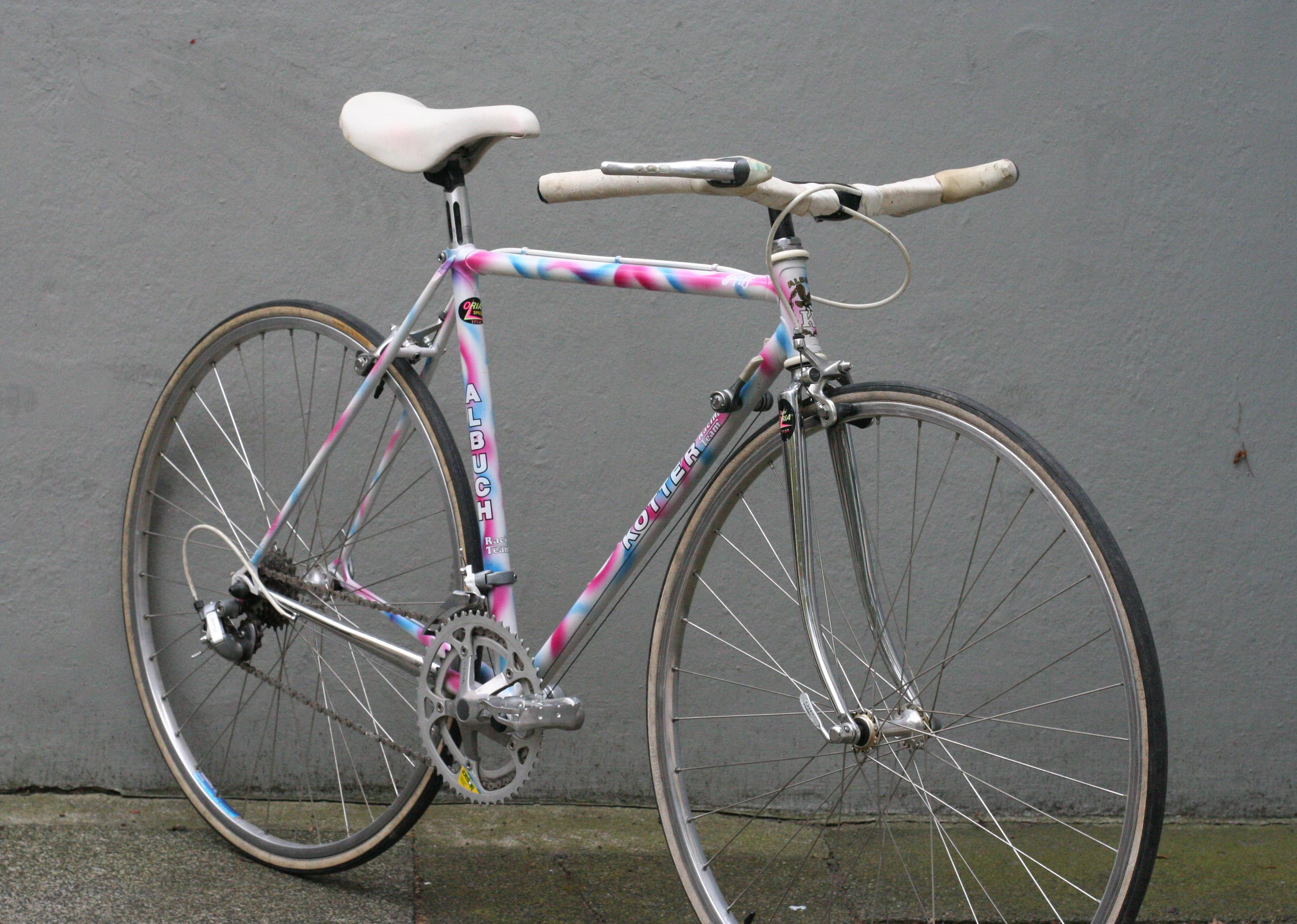 Albuch Kotter Roadbike